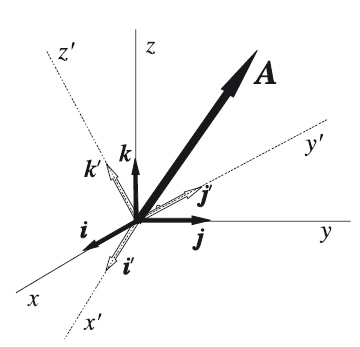 Cambio de base vectorial